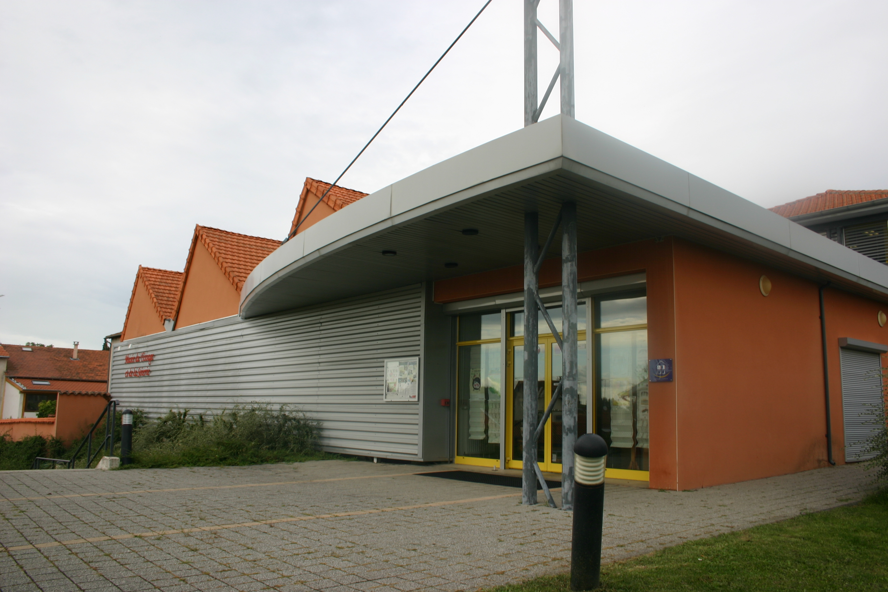 Musée du tissage et de la soierie de Bussières dans le département de la Loire.